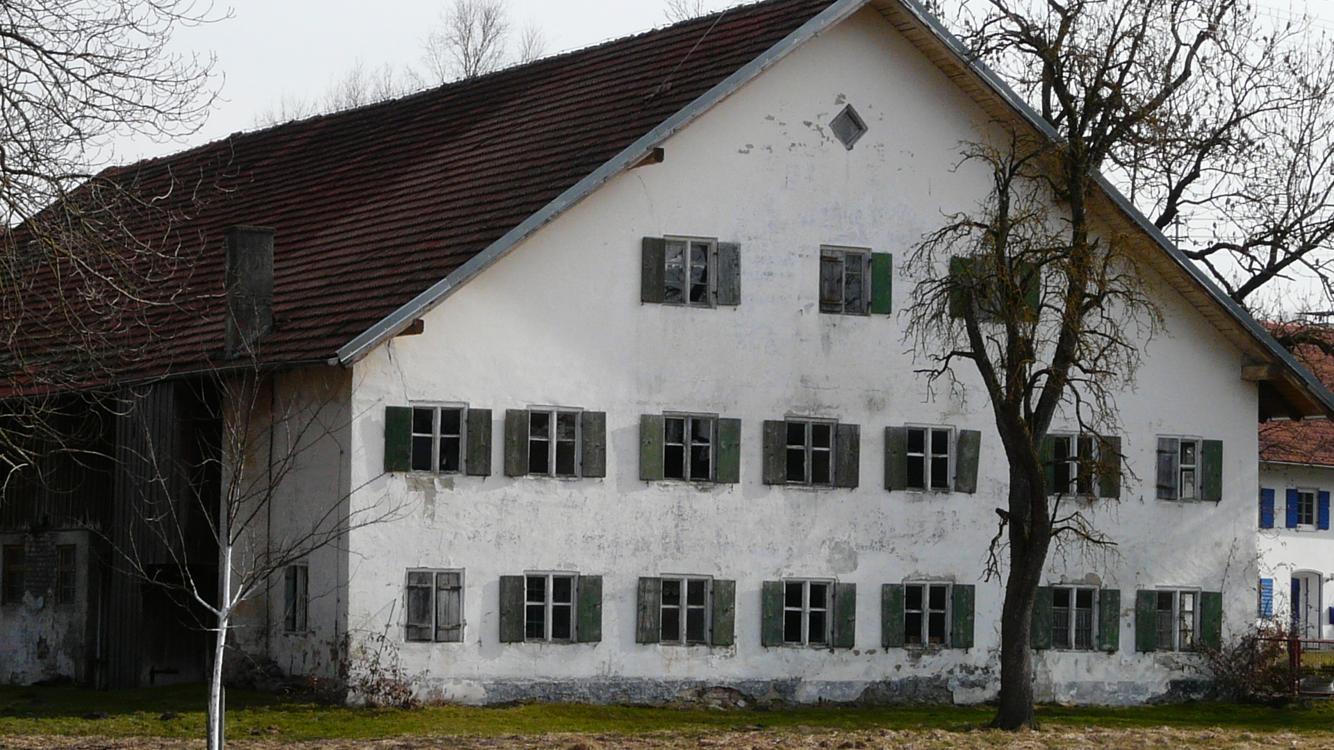 Stockstr. 1 in Lengenfeld, Oberostendorf